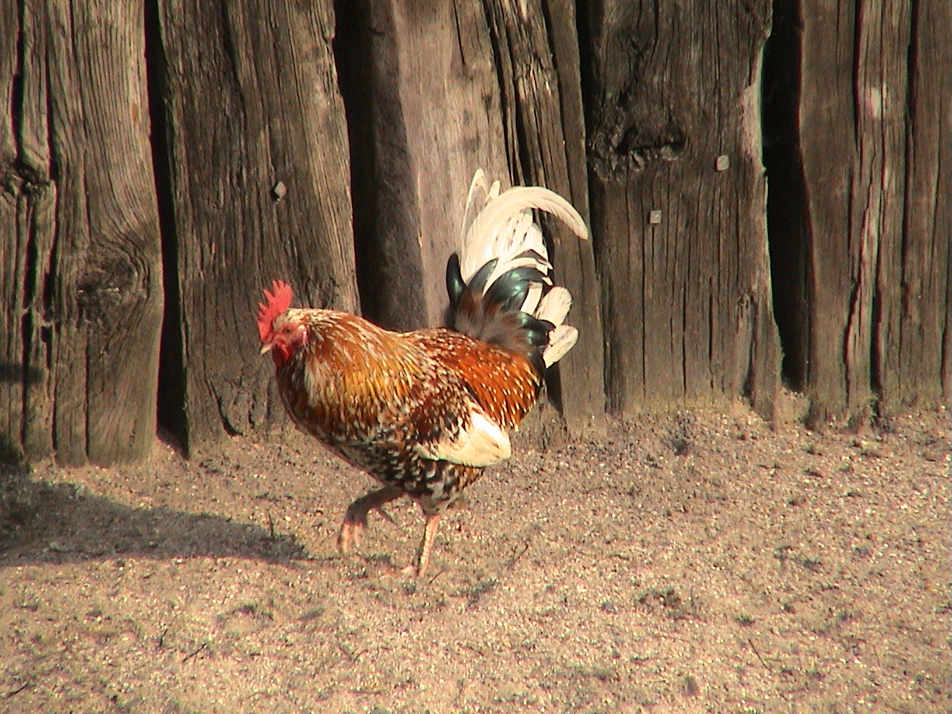 ديك بلدي